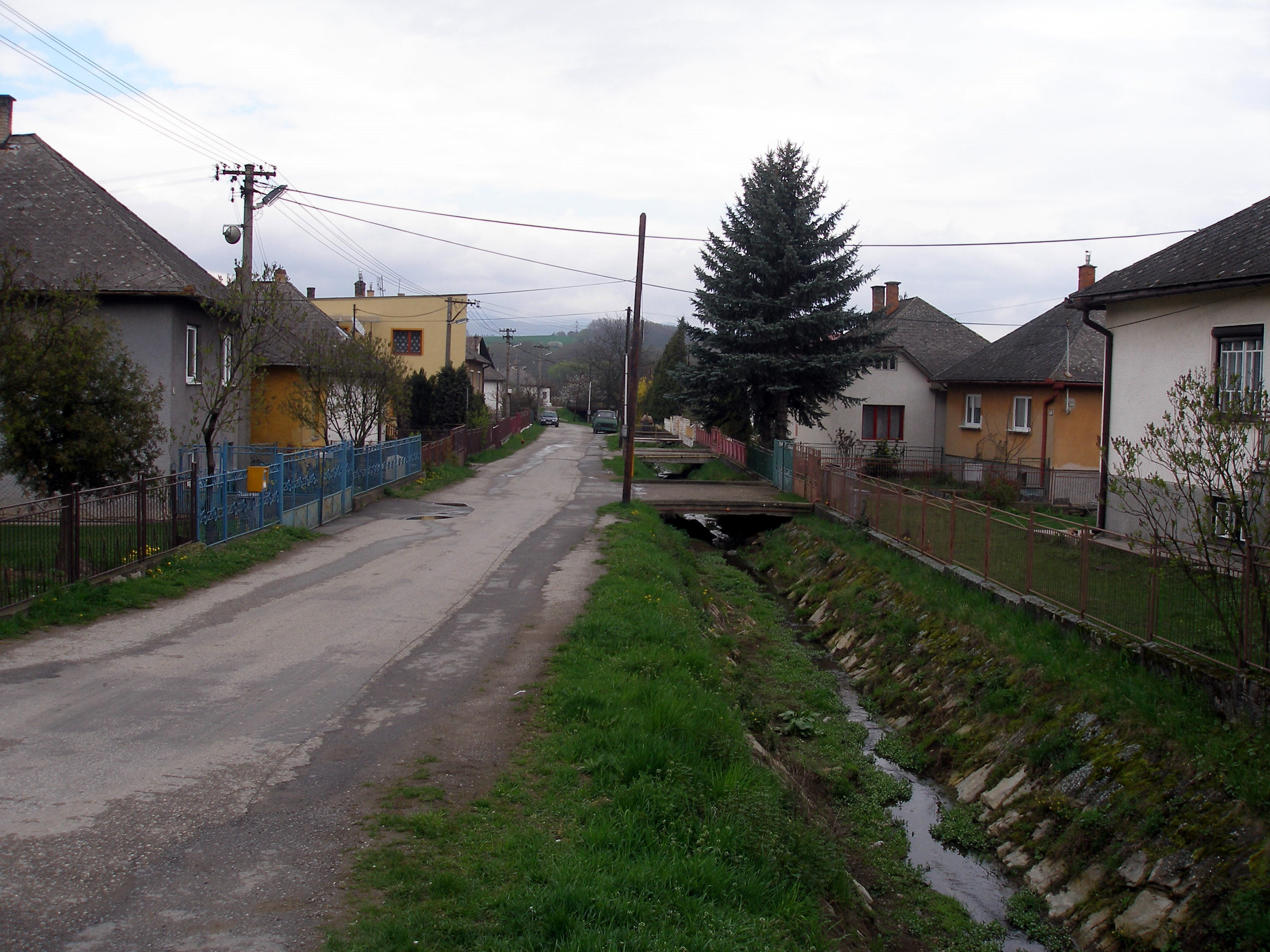 Obec Drienovská Nová Ves v okrese Prešov, región Šariš